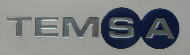 Temsa Logo